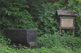 Vor dem ehmaligen Schachteingang